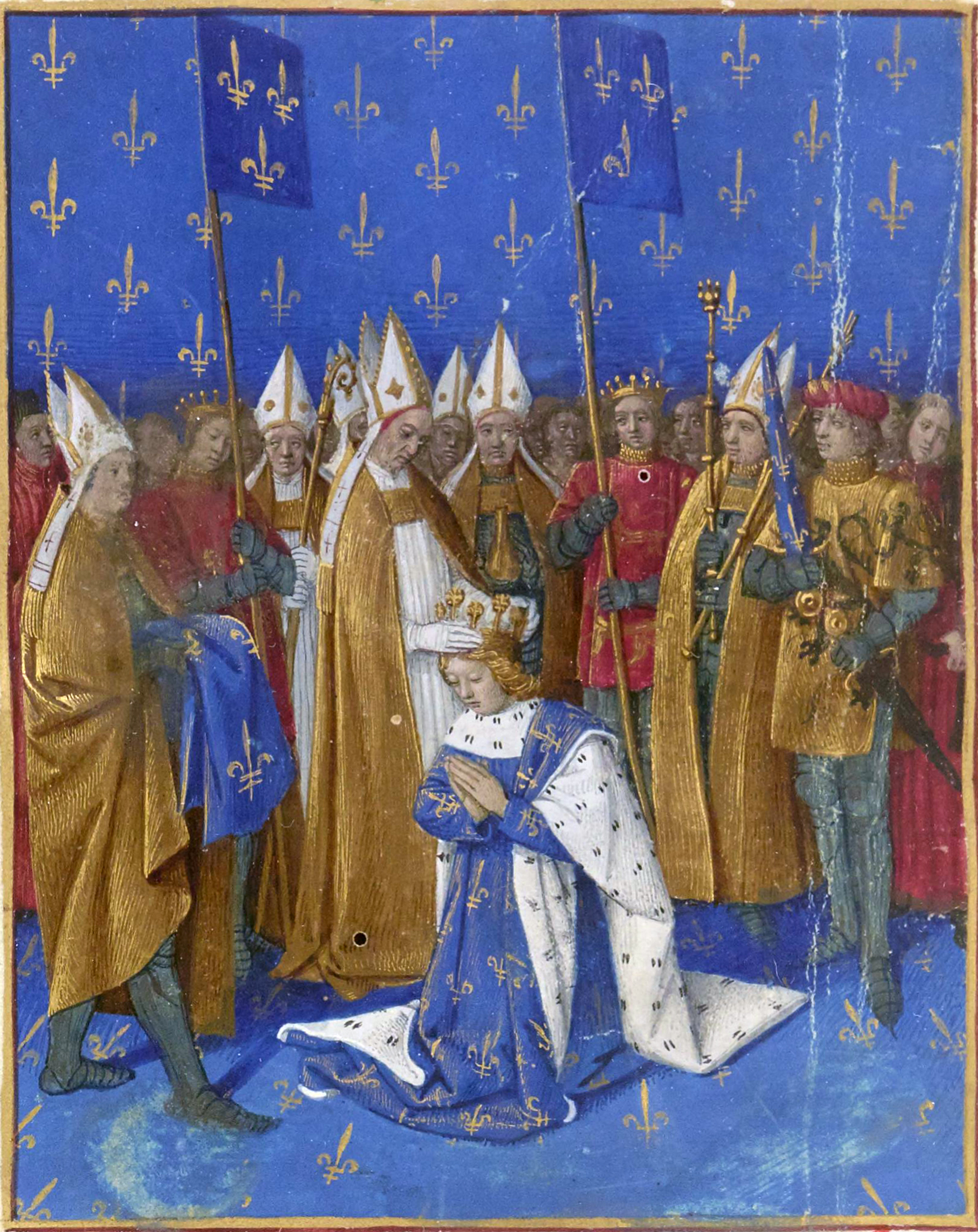 Couronnement de Charles VI le Bien-Aimé, Grandes Chroniques de France enluminées par Jean Fouquet, Tours, vers 1455-1460 Paris, BnF, département des Manuscrits, Français 6465, fol. 457v. (Livre de Charles VI). Le 4 novembre 1380, à Reims, Charles VI le Bien-Aimé est couronné par l'archevêque Richard Picque en présence de l'évêque de Beauvais, du duc de Guyenne, de l'archevêque de Laon, du duc de Normandie, de l'archevêque de Langres et du comte de Flandre.